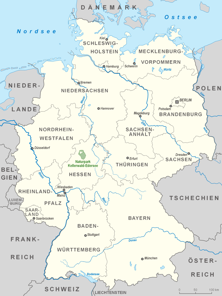 Karte des Naturparks Kellerwald-Edersee in Deutschland